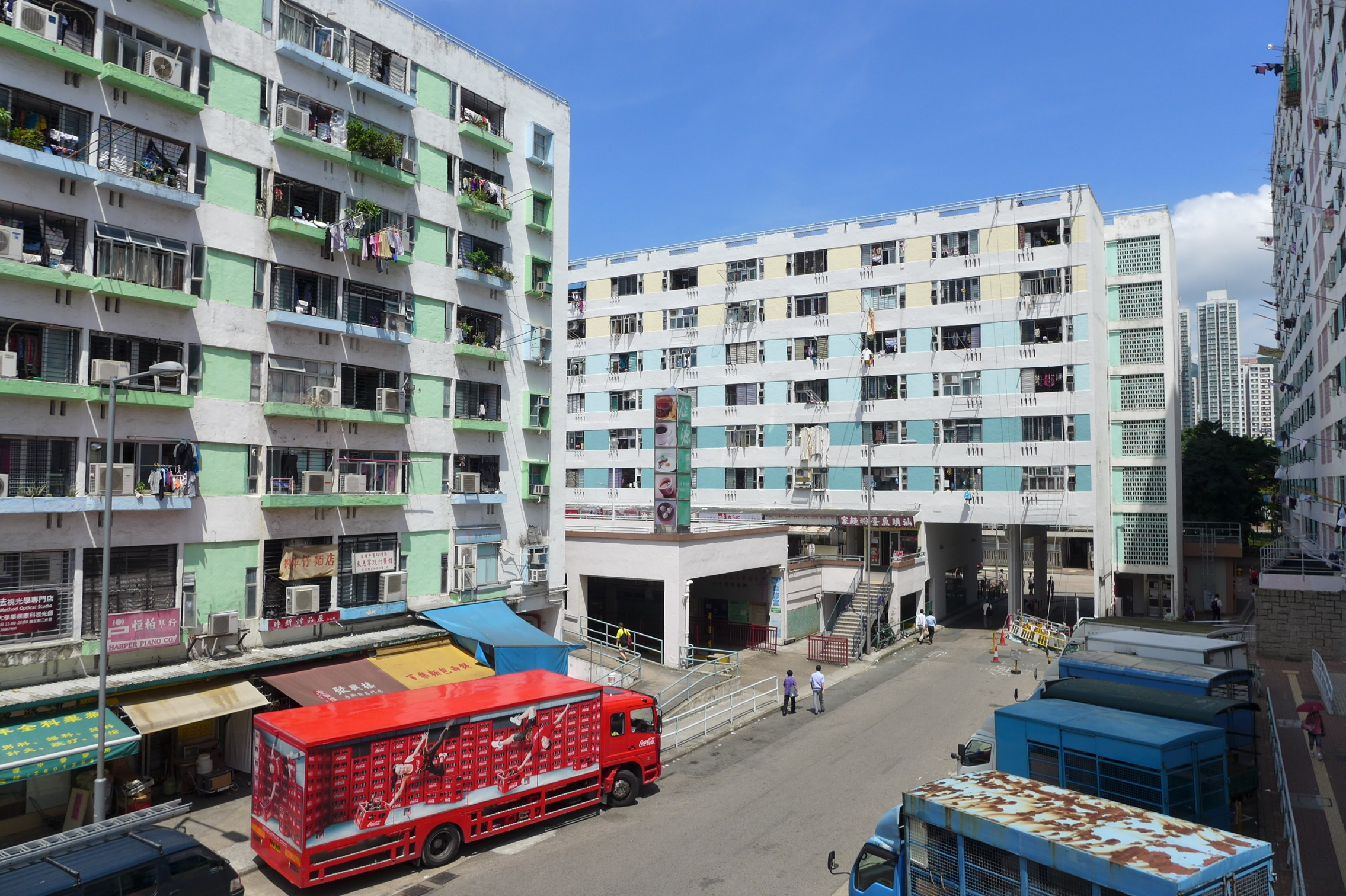 Lek Yuen Estate